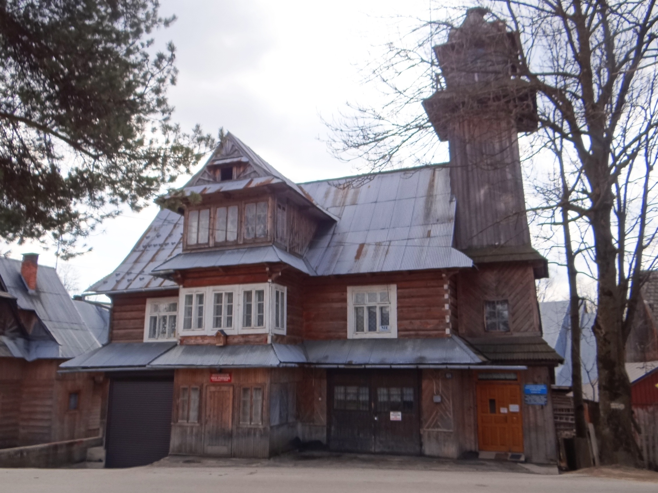 Dzianisz. Budynek OSP